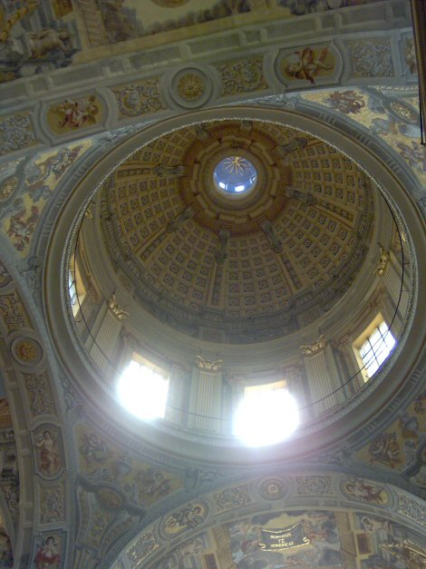 Marco Vaccaro - Cupola della chiesa di San Francesco - Chieti